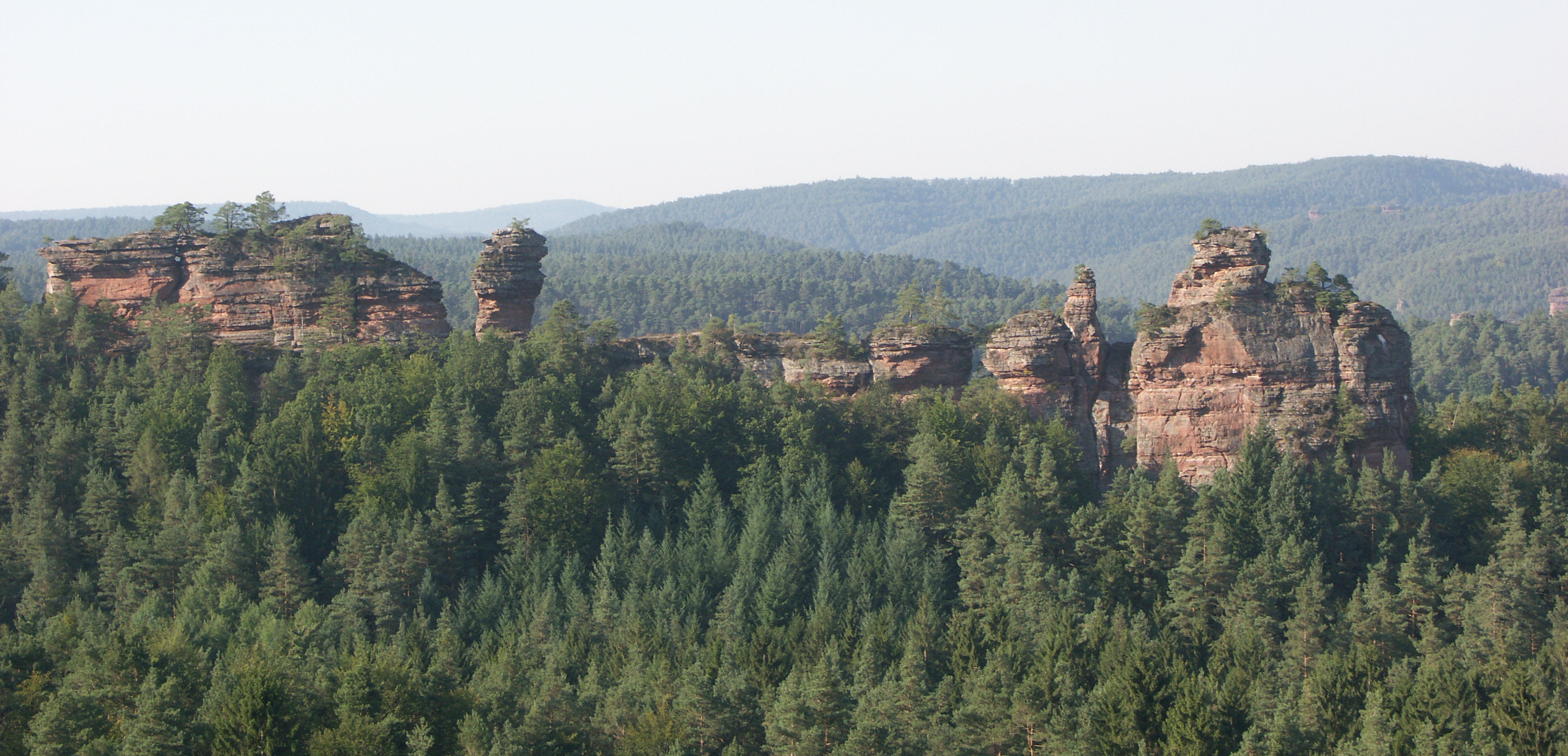 Deutschland, Rheinland-Pfalz, Wasgau, Lämmerfelsen-Südwände